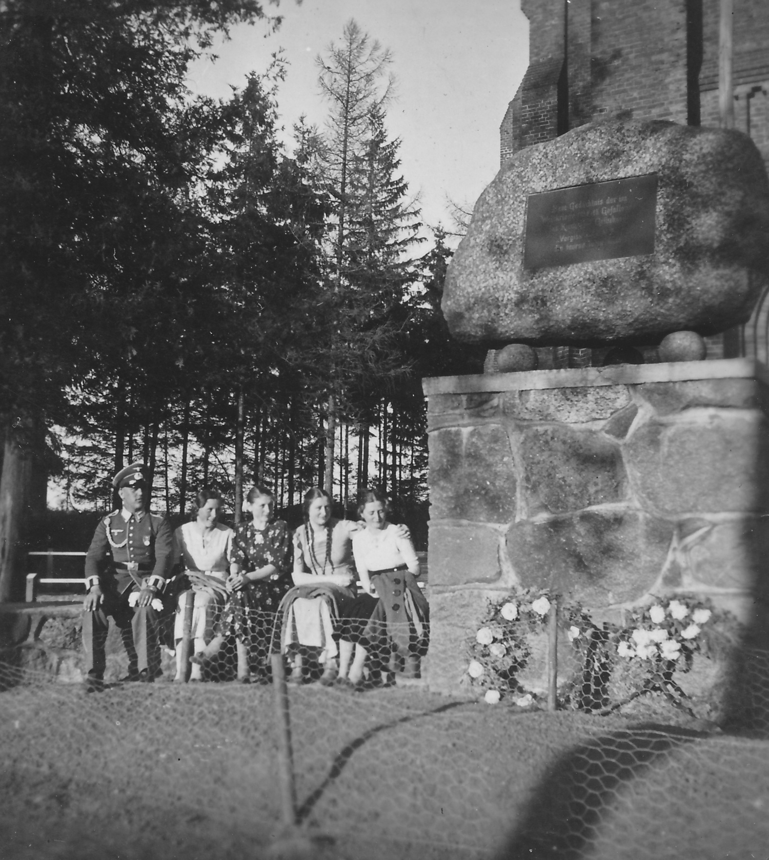 Kriegerdenkmal für die Gefallenen des Ersten Weltkriegs vor der evangelischen Kirche in Grünheide (Kreis Insterburg), Aufnahme 1937